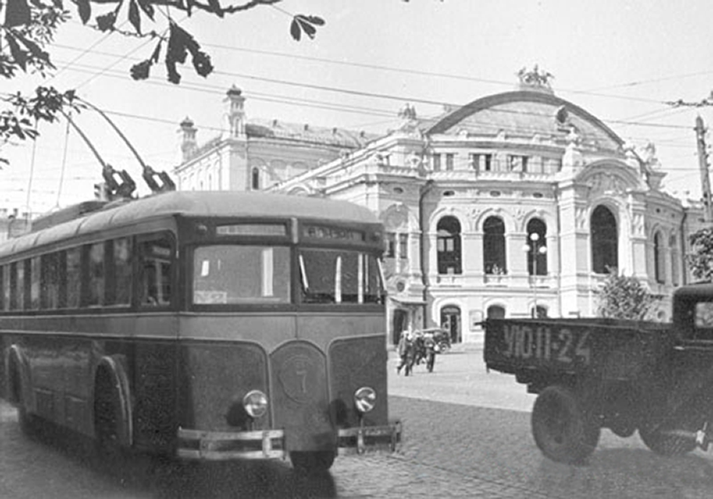 ЛК-5 - один із перших київських тролейбусів